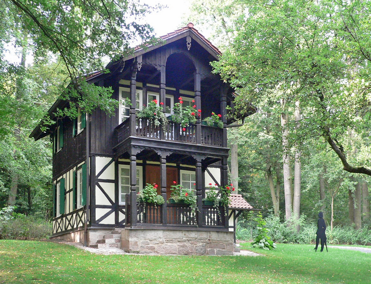 Goldberghaus in Coburg, Wirkstätte des Dichters Friedrich Rückert